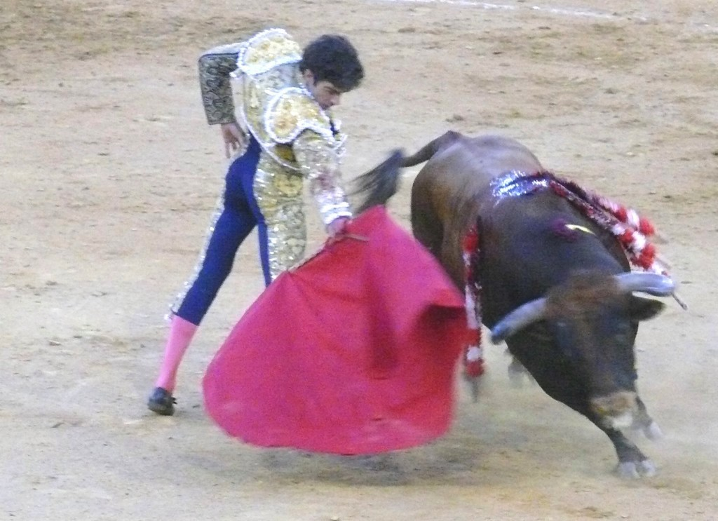 Derechazo de José Tomás. Almería. Agosto 2008.